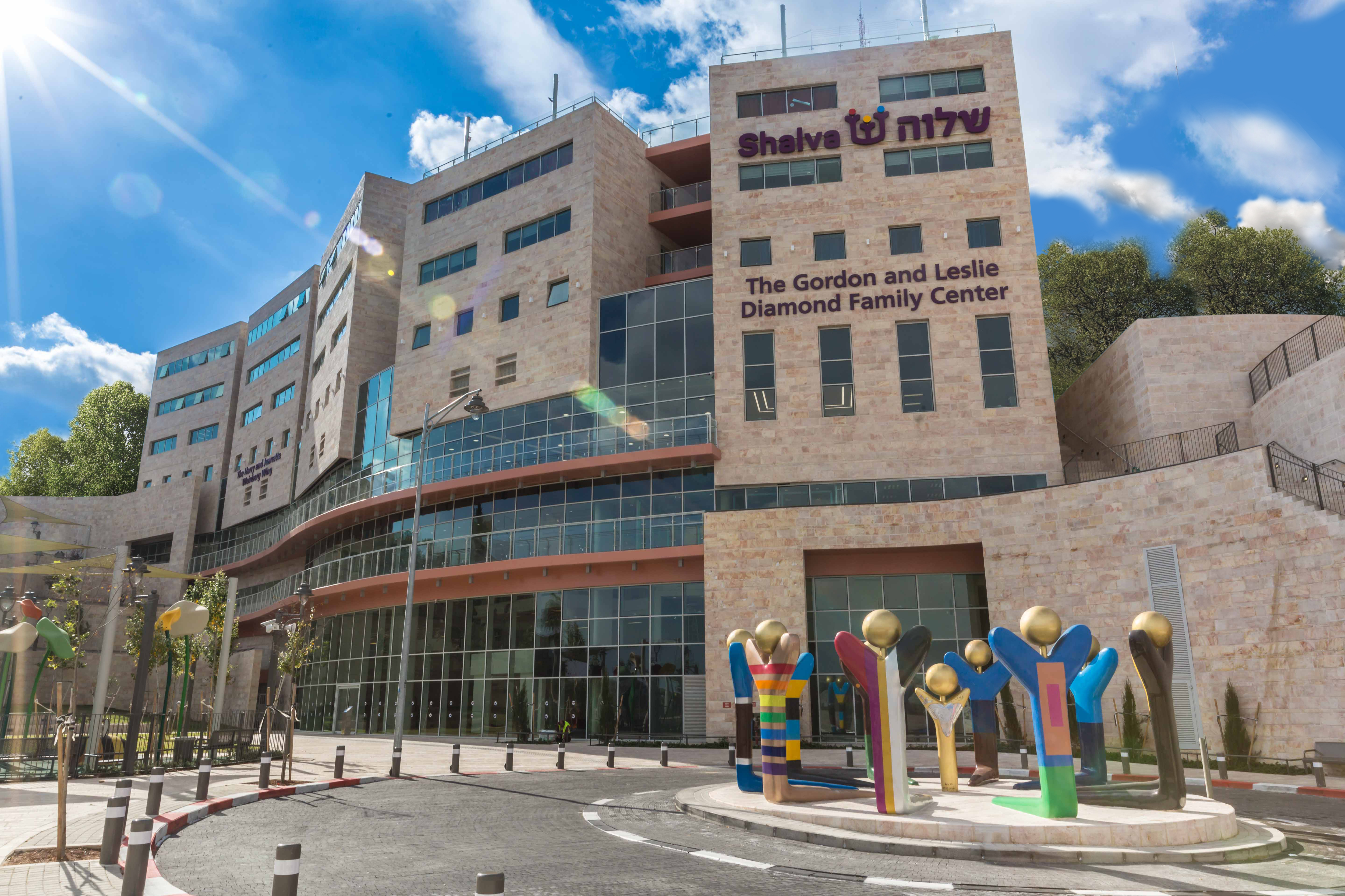 המרכז הלאומי הפתח אשר פתח את שעריו בספטמבר 2016